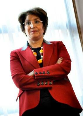 Le député Daniel Goldberg (au micro) et la vice-président du Sénat Bariza Khiari aux vœux de Stéphane Troussel à La Courneuve le 15 janvier 2012.